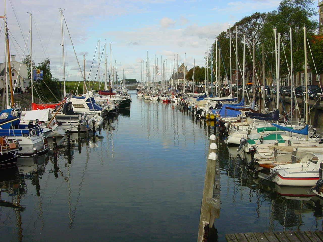 Harbor Veere Holland